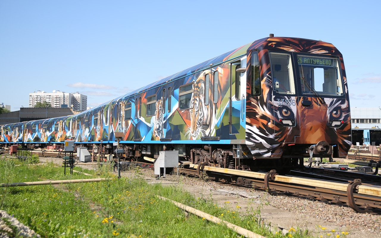 Поезд на территории депо